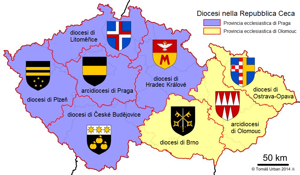 mappa delle diocesi cattoliche nella Repubblica Ceca